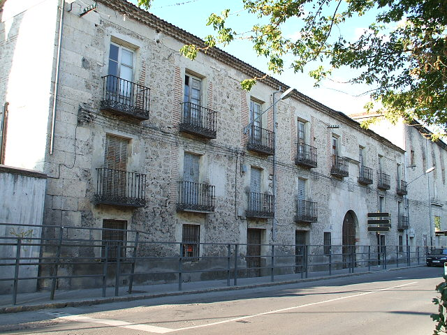 Vista del convento de Santa Ana de Cuéllar.